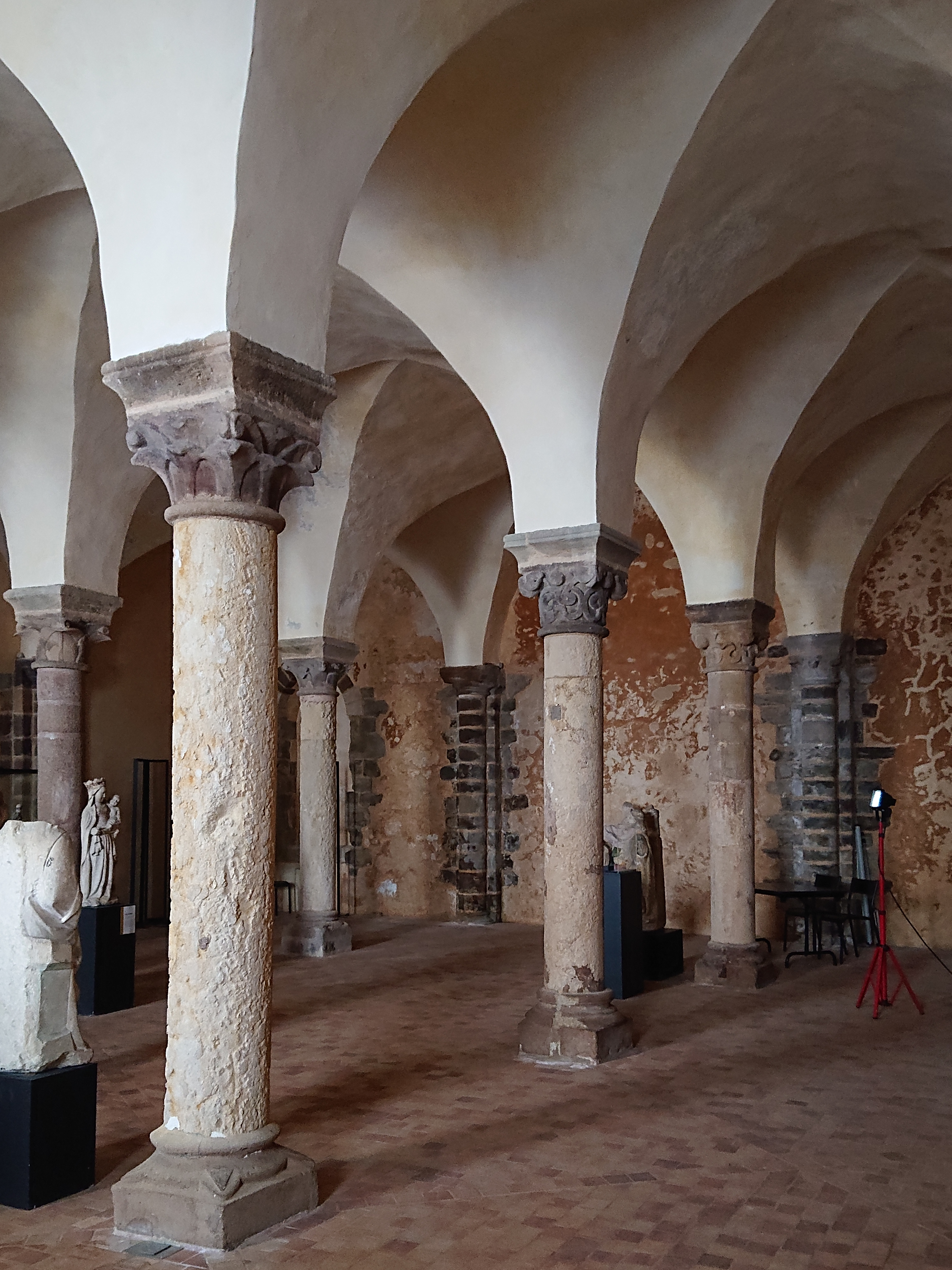 Chapelle du Vieux-Château de Laval, France.